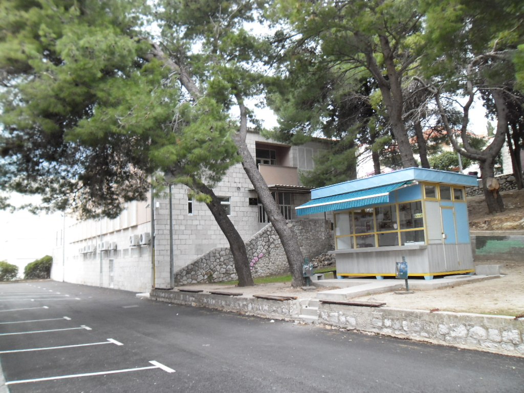 zgrada Ekonomske i trgovačke škole Dubrovnik